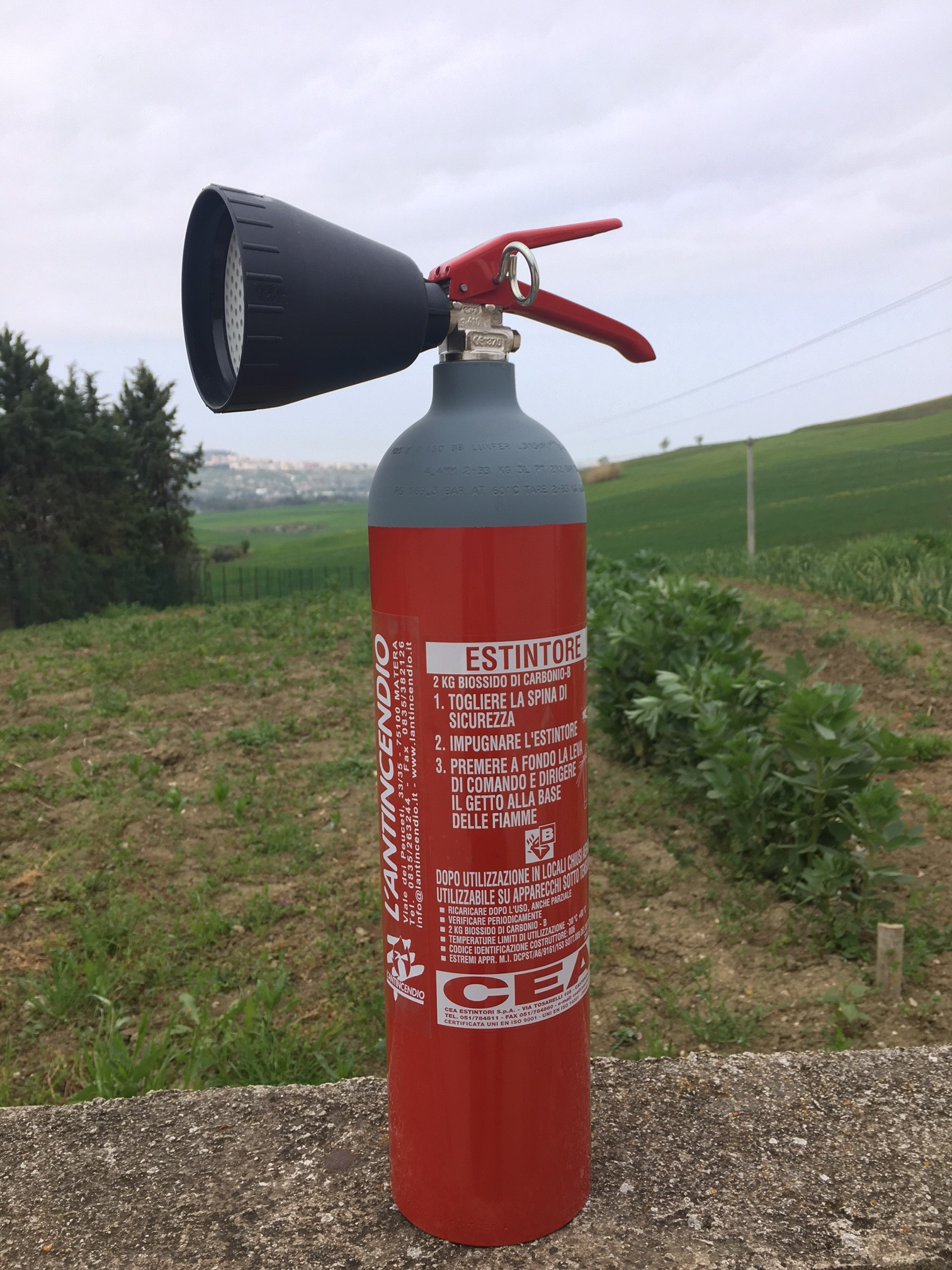 Estintore a Biossido di Carbonio L'Antincendio